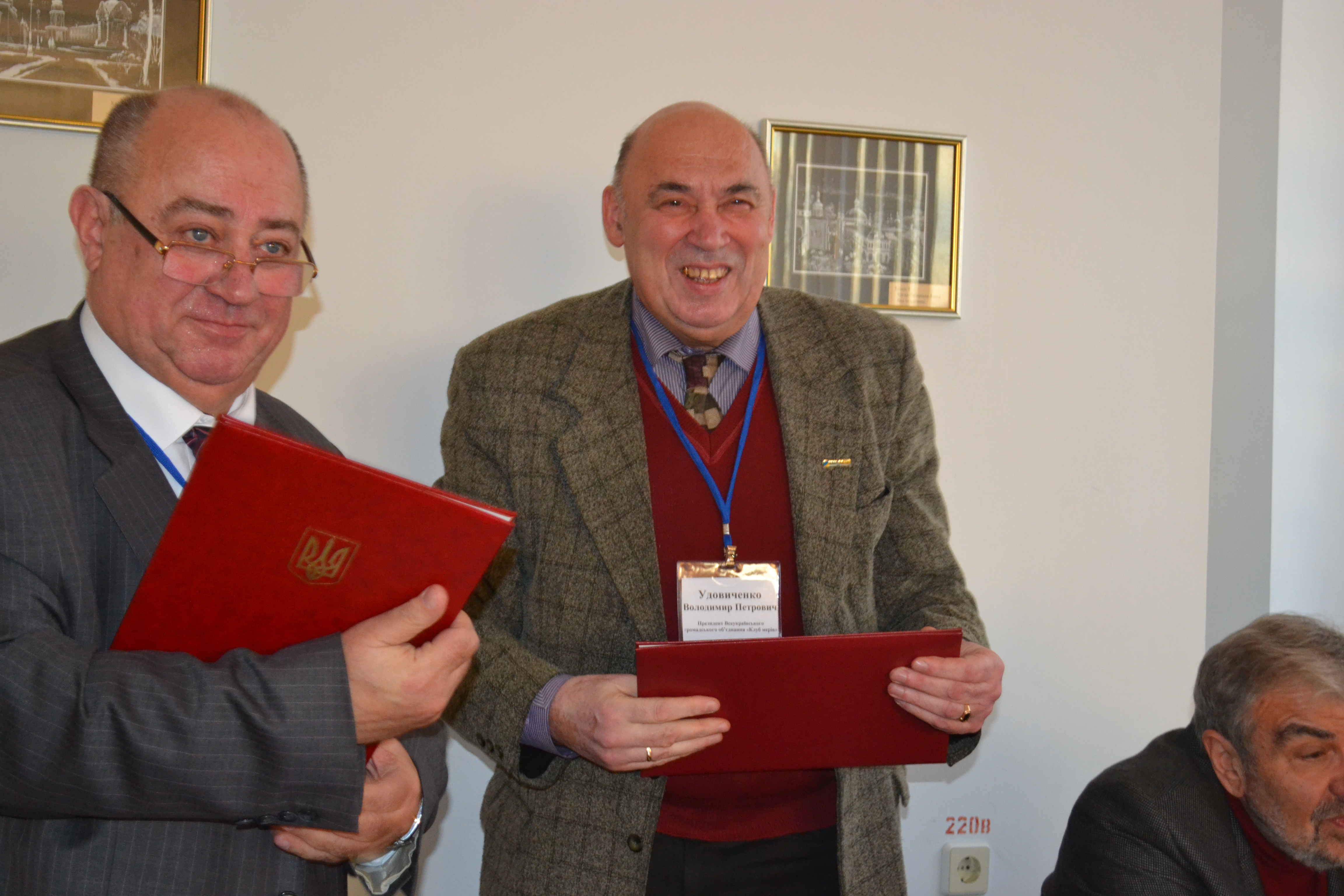 Під час семінару "Сучасне управління містом" 15.12.2015 р. відбулося урочисте підписання Меморандуму про співпрацю між Всеукраїнським громадським об'єднанням «Клуб мерів» та громадською спілкою «Фонд розвитку та інновацій ЖКГ».